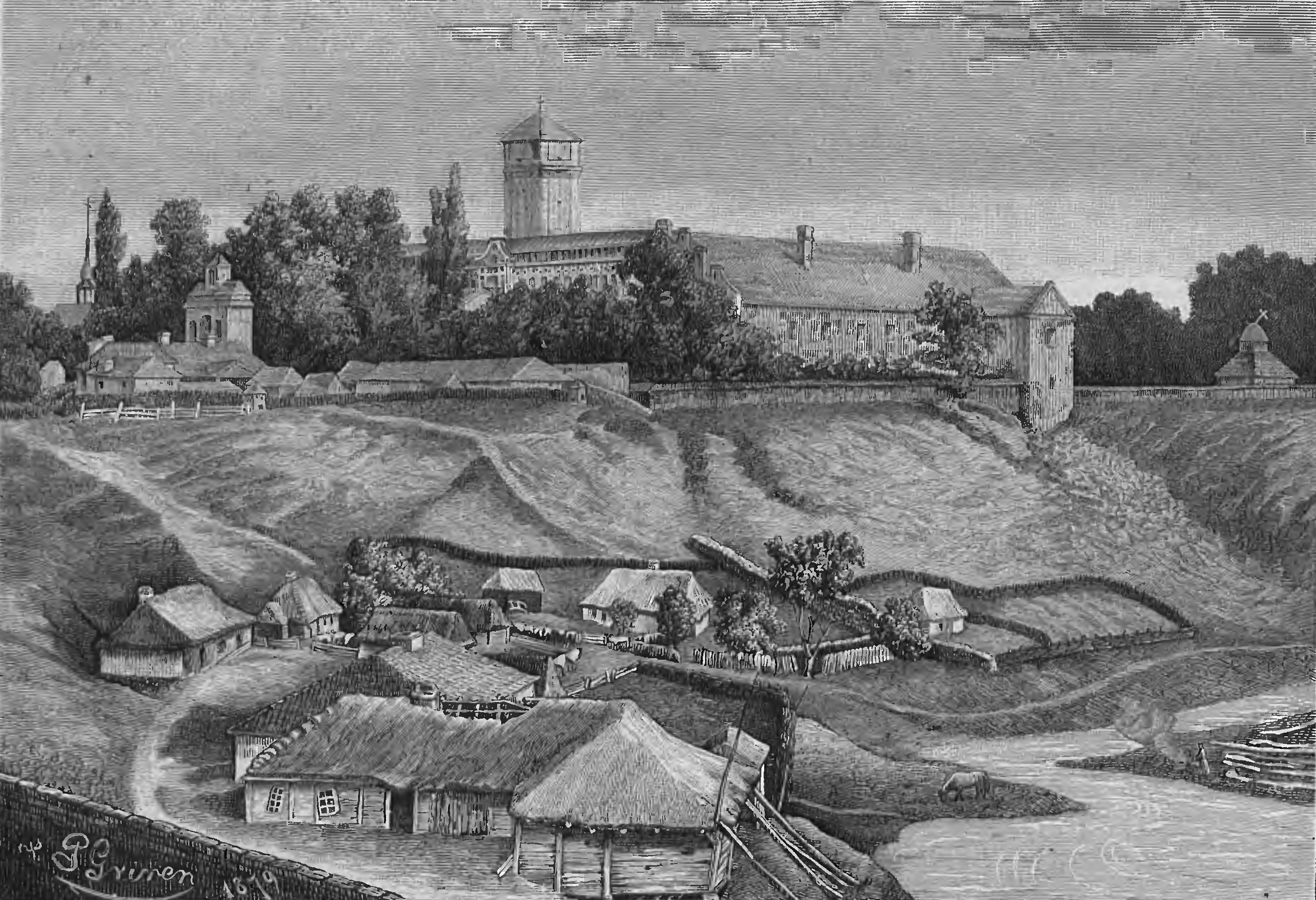 Монастир оо. Бернардинів у Заславі.